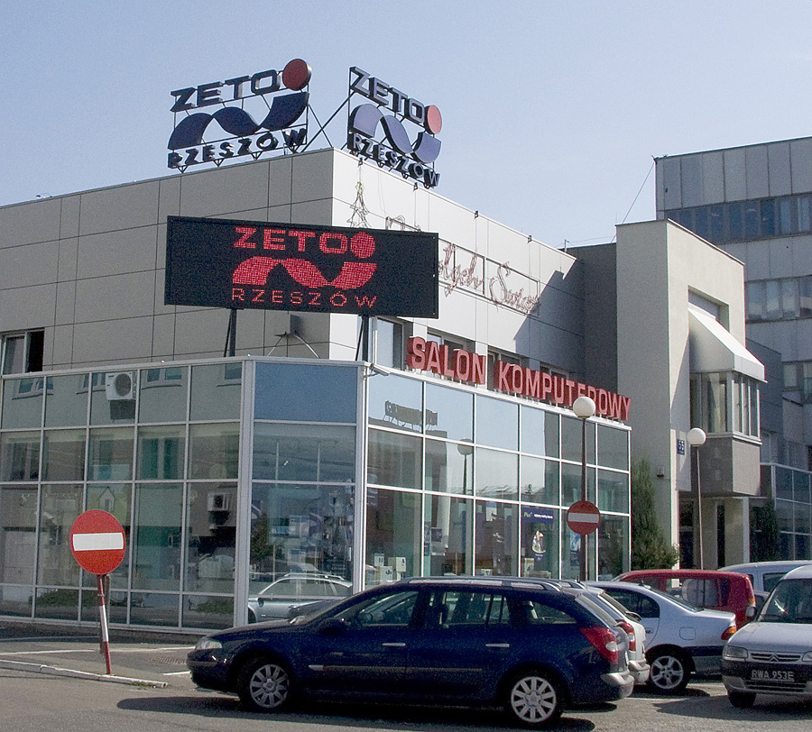 Budynek firmy ZETO-RZESZÓW Sp. z o.o. w Rzeszowie, przy ul. Rejtana 55